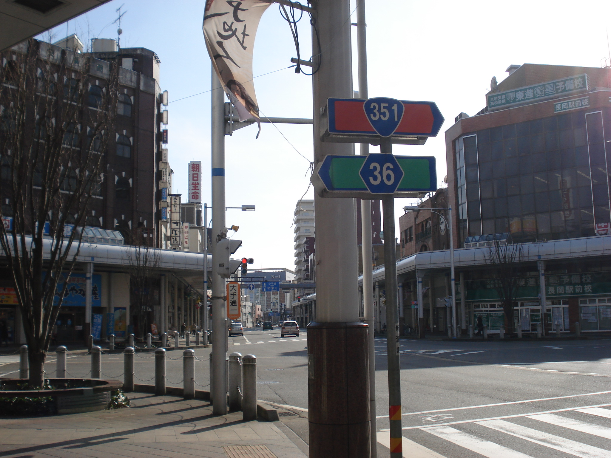 新潟県道36号 長岡停車場線 大手通交差点